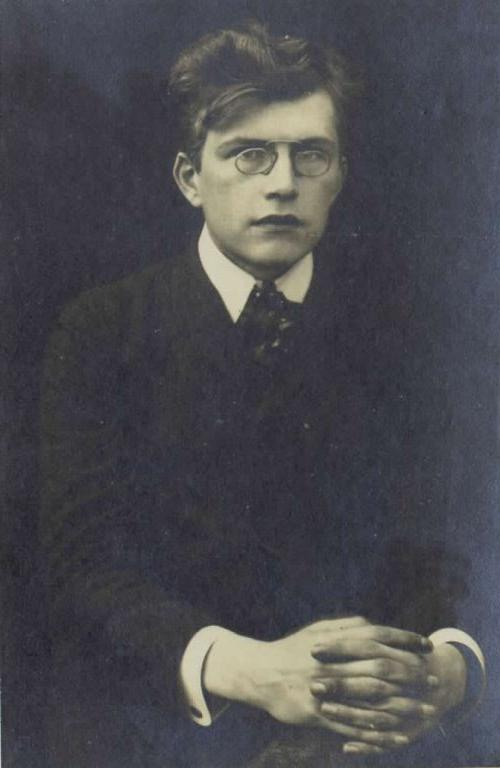 Vladimir Levstik